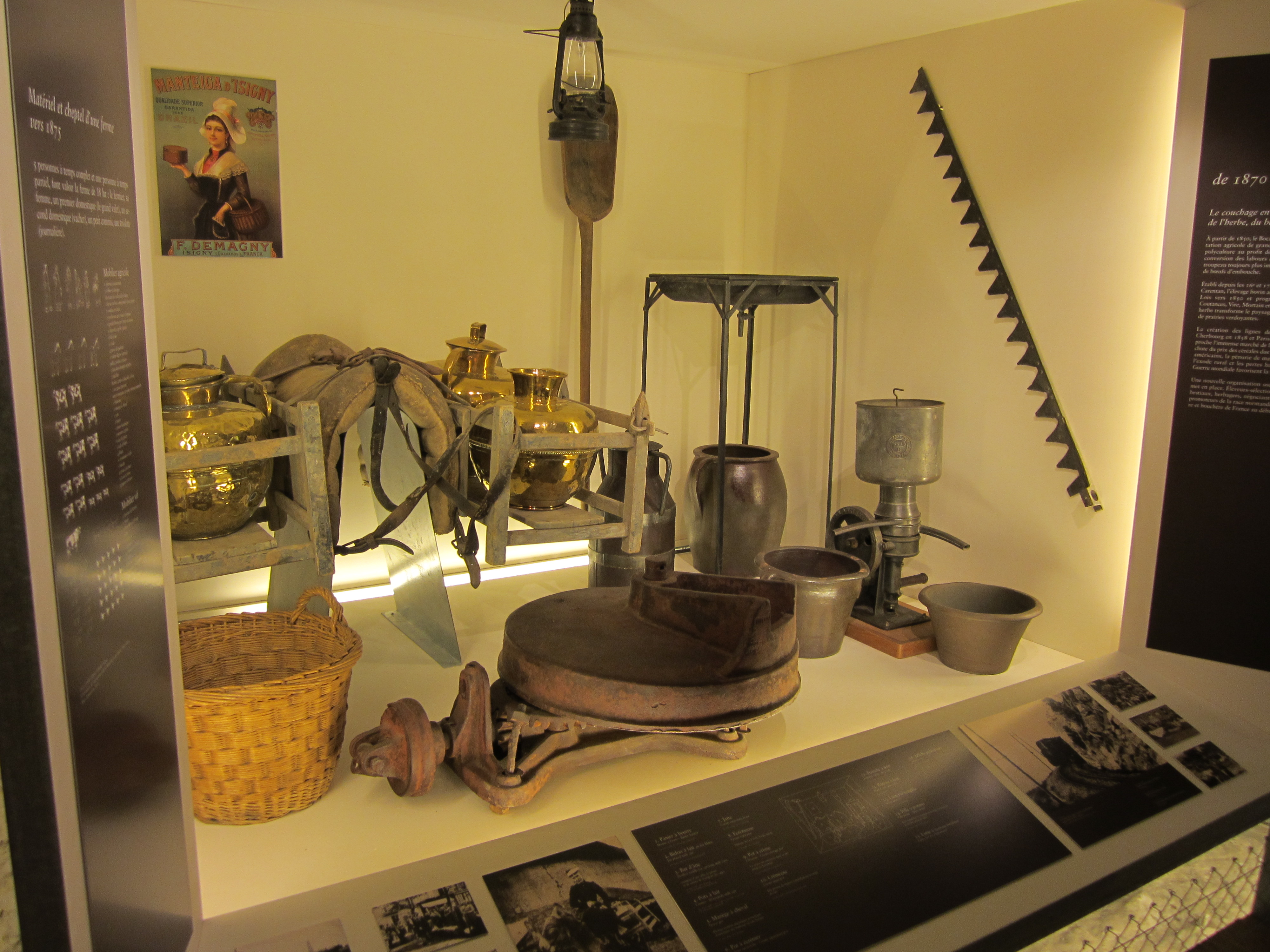 Ferme de Boisjugan, Saint-Lô, Manche